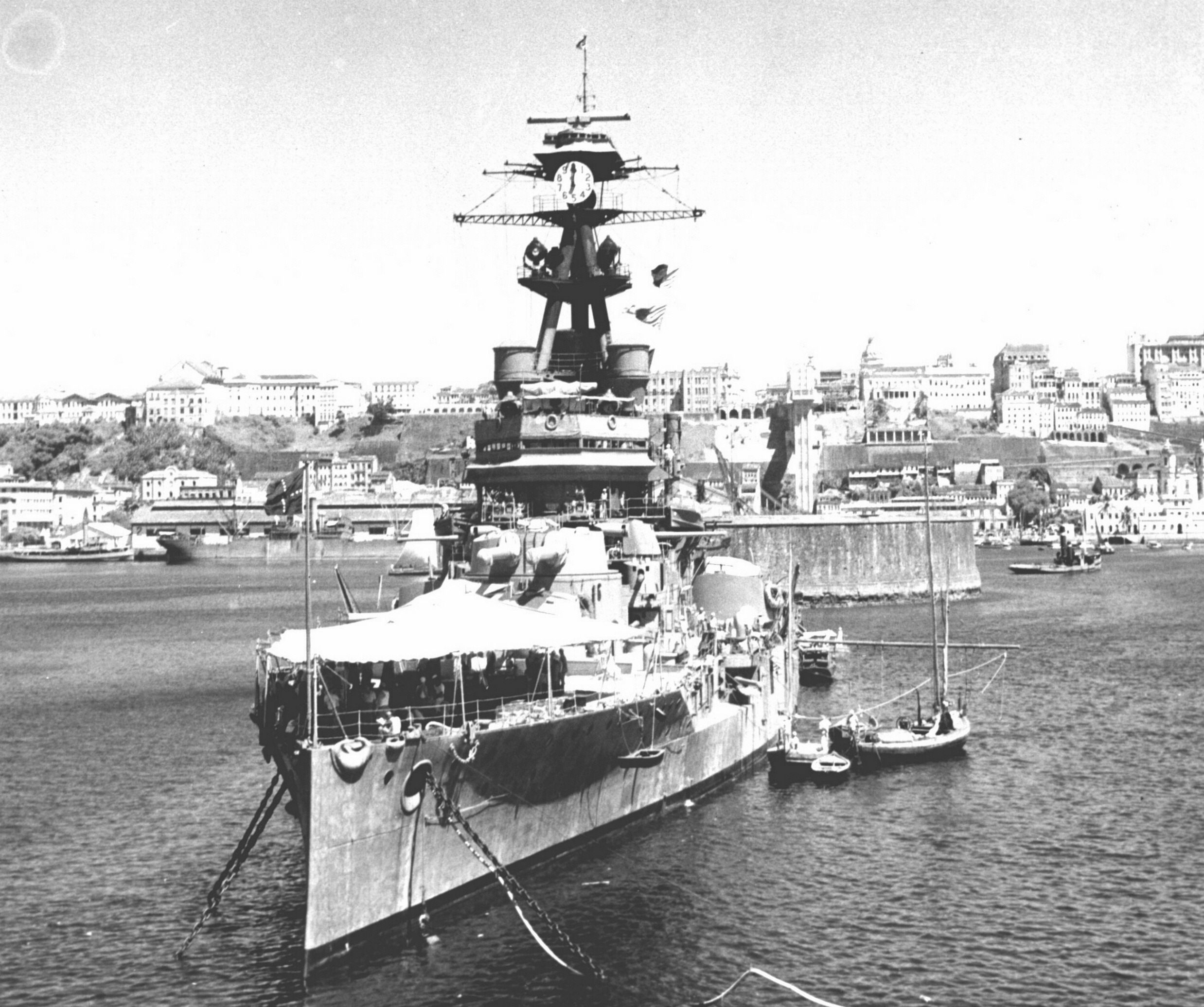 Arquivo liberado pela Marinha do Brasil através de projeto GLAM com Wiki Educação Brasil Encouraçado Minas Geraes (1942) durante a segunda guerra mundial no porto de Salvador, Bahia - Naval ship of Brazil.